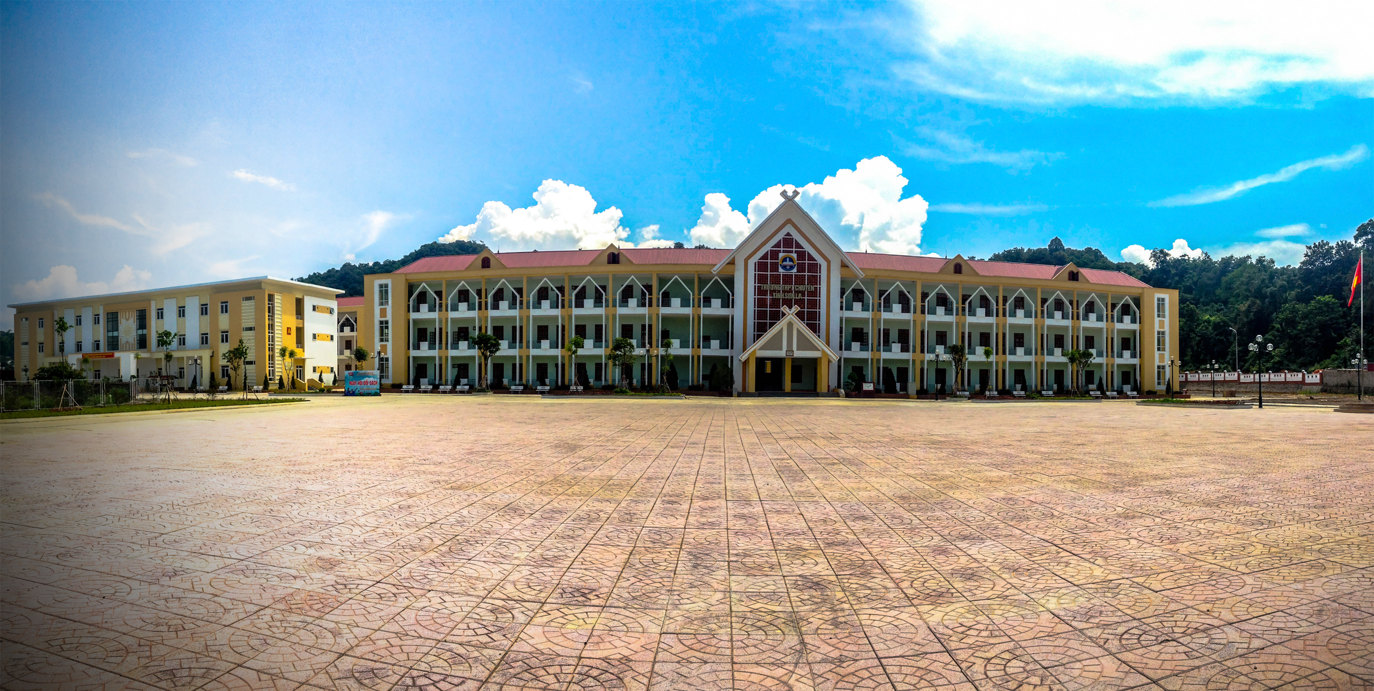 Sân nhà B Trường Trung học phổ thông chuyên tỉnh Sơn La (tháng 9 năm 2015)